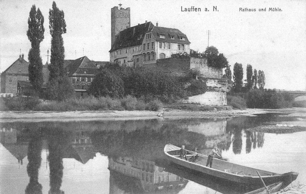 Der Neckar, das Rathaus (Grafenburg) und die Mühle in Lauffen am Neckar